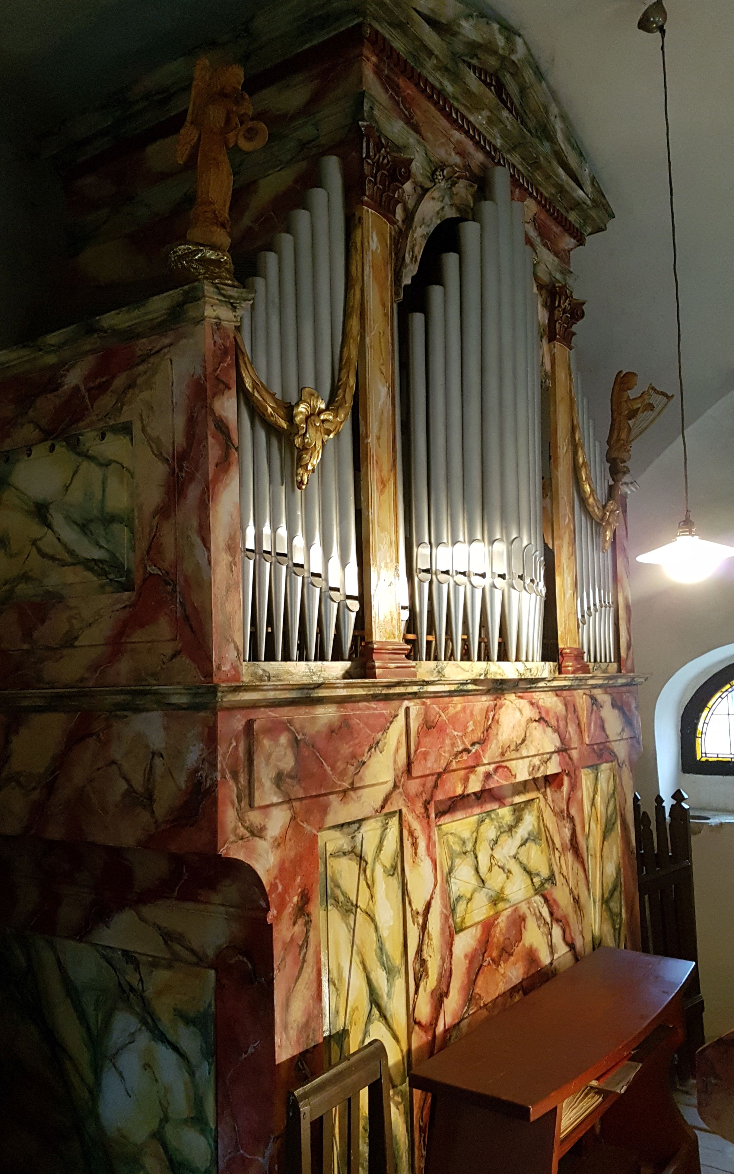 Ansicht der Grafenauer Orgel der Johanneskirche in Tultschnig, Kärnten.